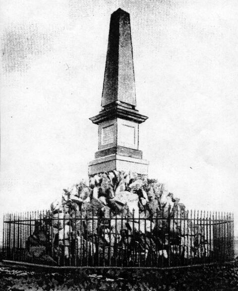 Historický snímek Památníku zrušení roboty, postavený v Teplicích.